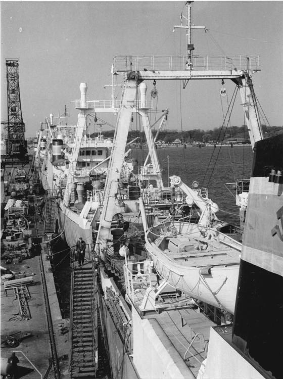 Stralsund, Volkswerft Stralsund, Ausrüstungskai, "Atlantik" Zentralbild Kohls krue 18.5.1967 50 Jahre Sowjetmacht Roststock: "Atlantiks" am Ausrüstungskai des VEB Volkswerft Stralsund, dessen Werktätige zu Ehren des 50. Jahrestages der Großen Sozialistischen Oktoberrevolution zur Weiterführung des sozialistisch Wettbewerbes aufgerufen haben."